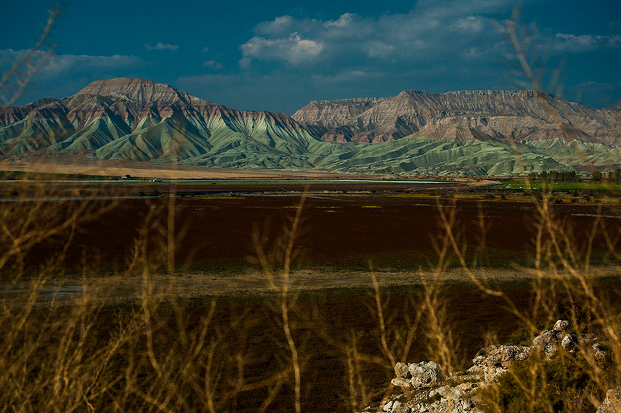 Davutoğlan Kuş Cenneti, Nallıhan / Ankara